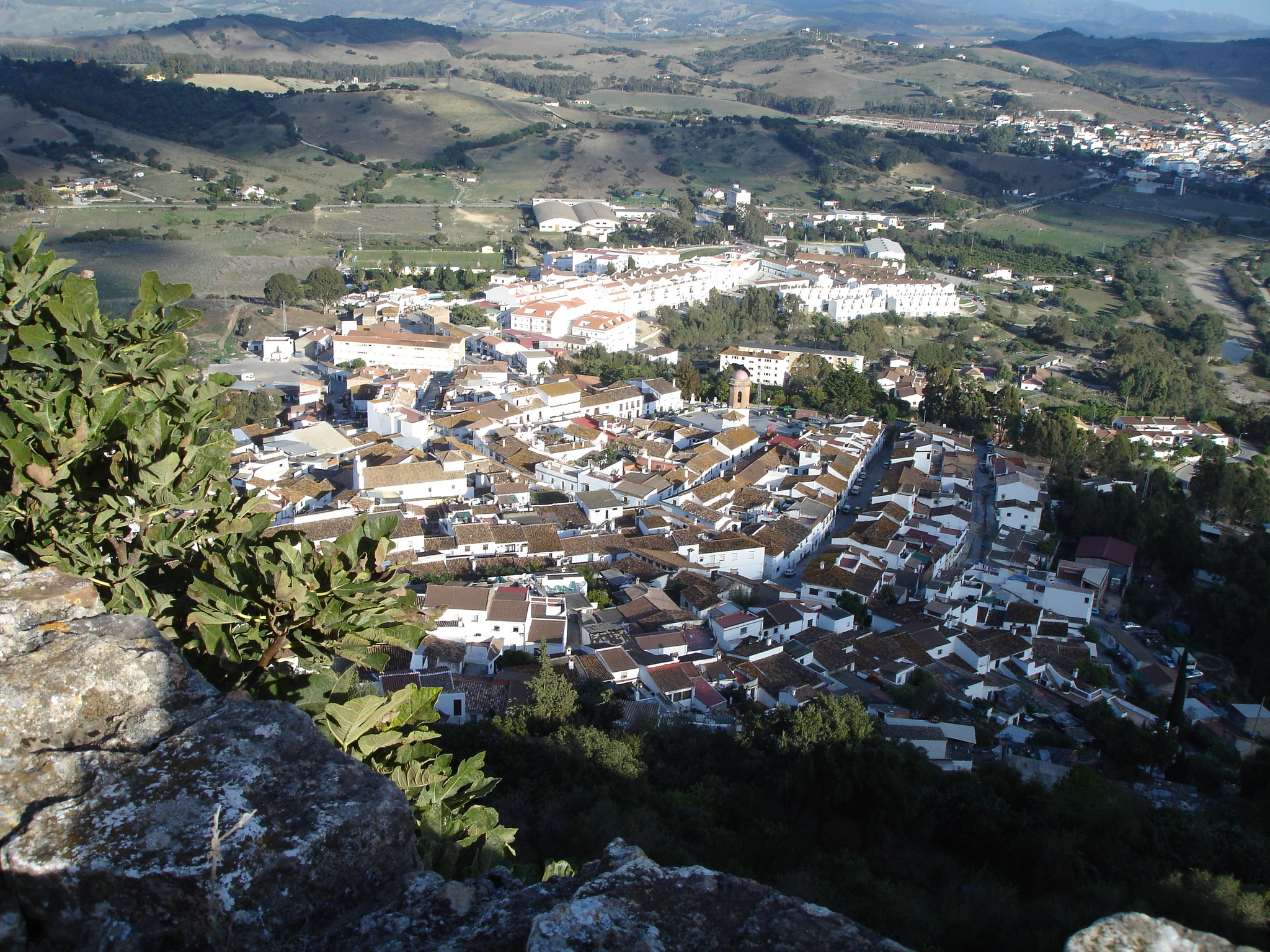 Vista de Jimena de la Frontera desde su castillo